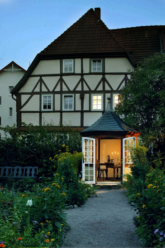 Haus Rittergasse Nr. 11 in Eisenach (davor Bachhaus-Garten)